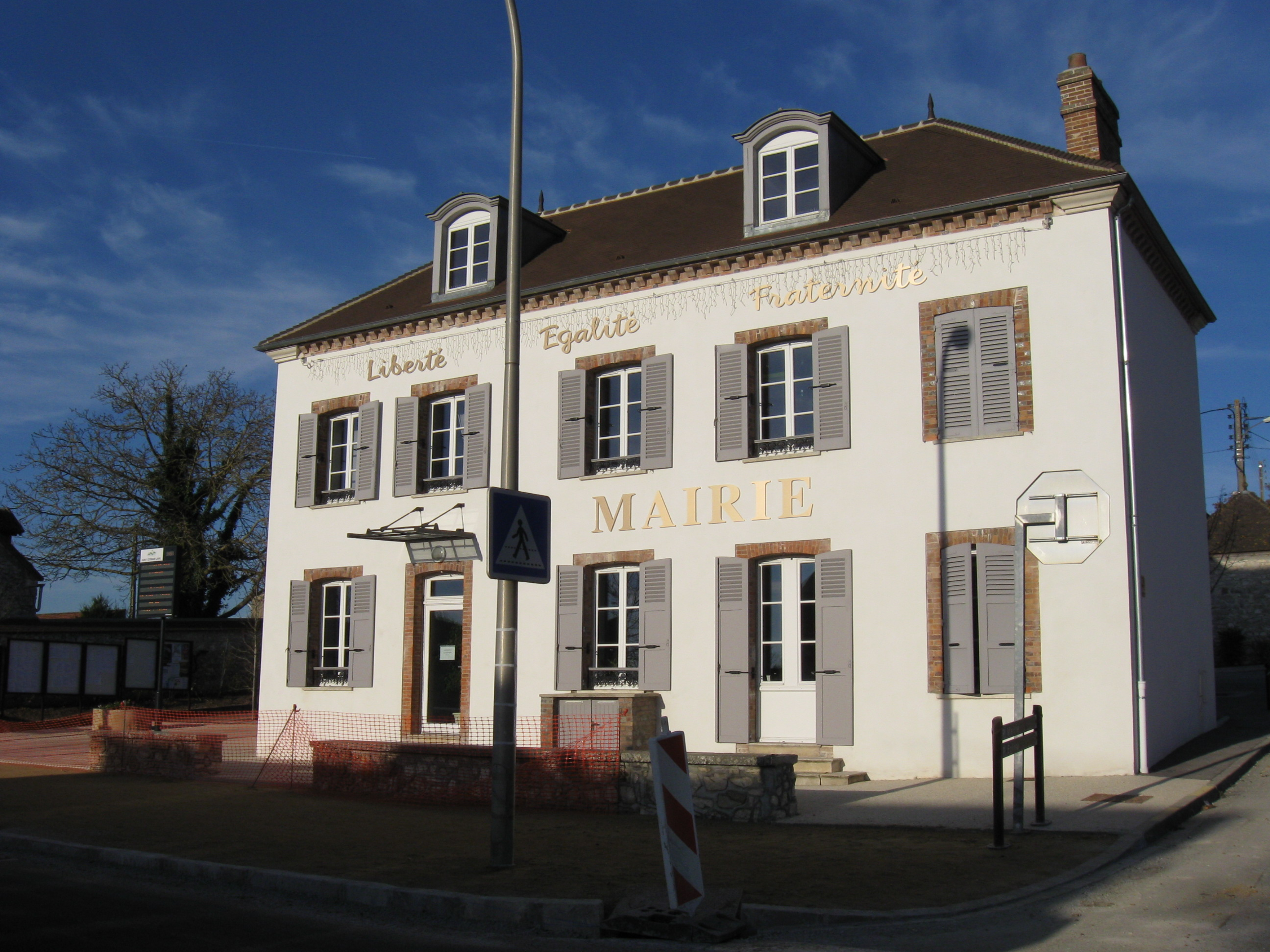 Mairie de Saint-Germain-Laval. (département de la Seine-et-Marne, région Île-de-France).